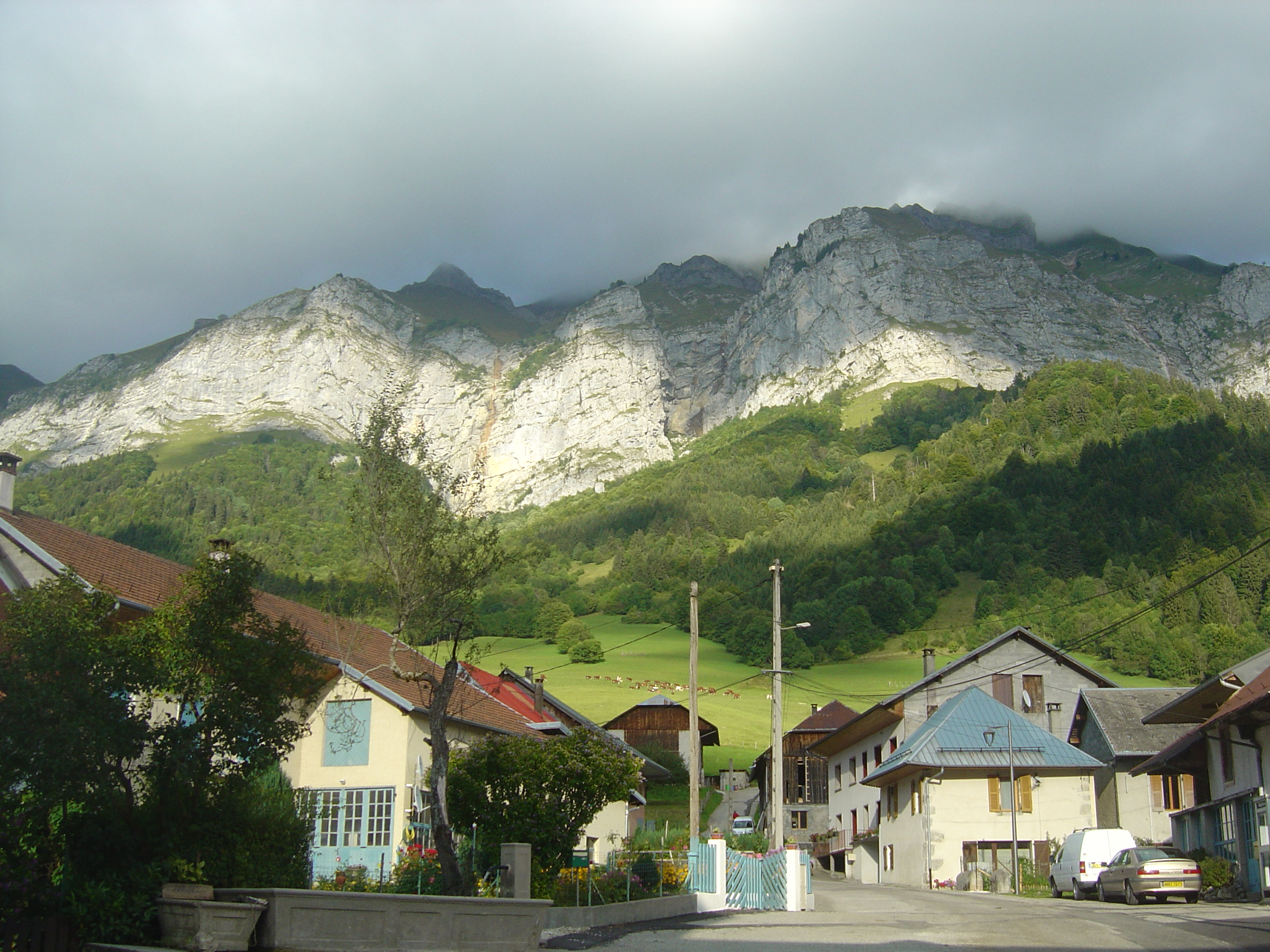 Le Trélod vu depuis Doucy-en-Bauges